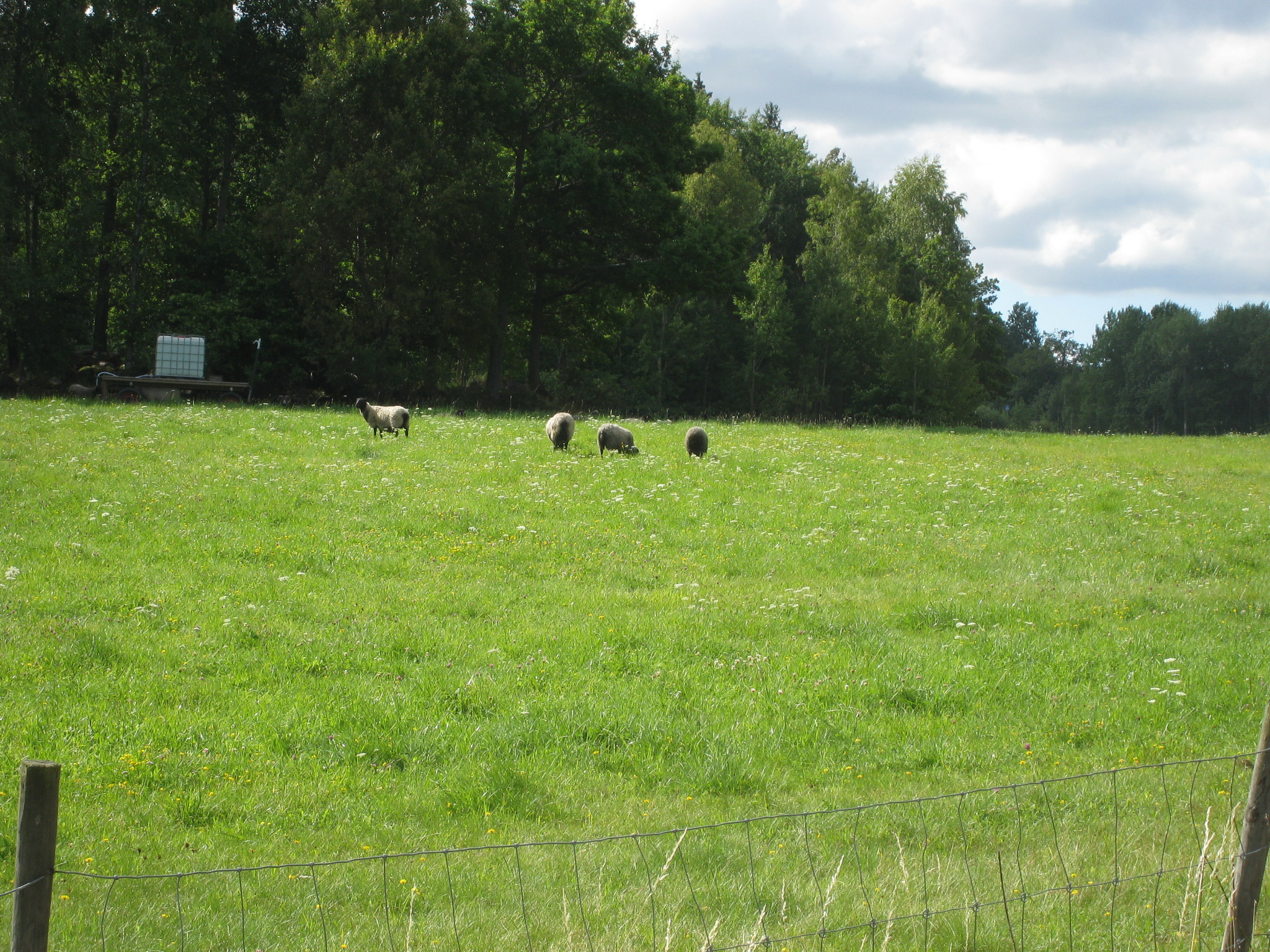 Henrikstorp, beteshage söder om Mälarvägen, Järfälla kommun, Stockholms län.